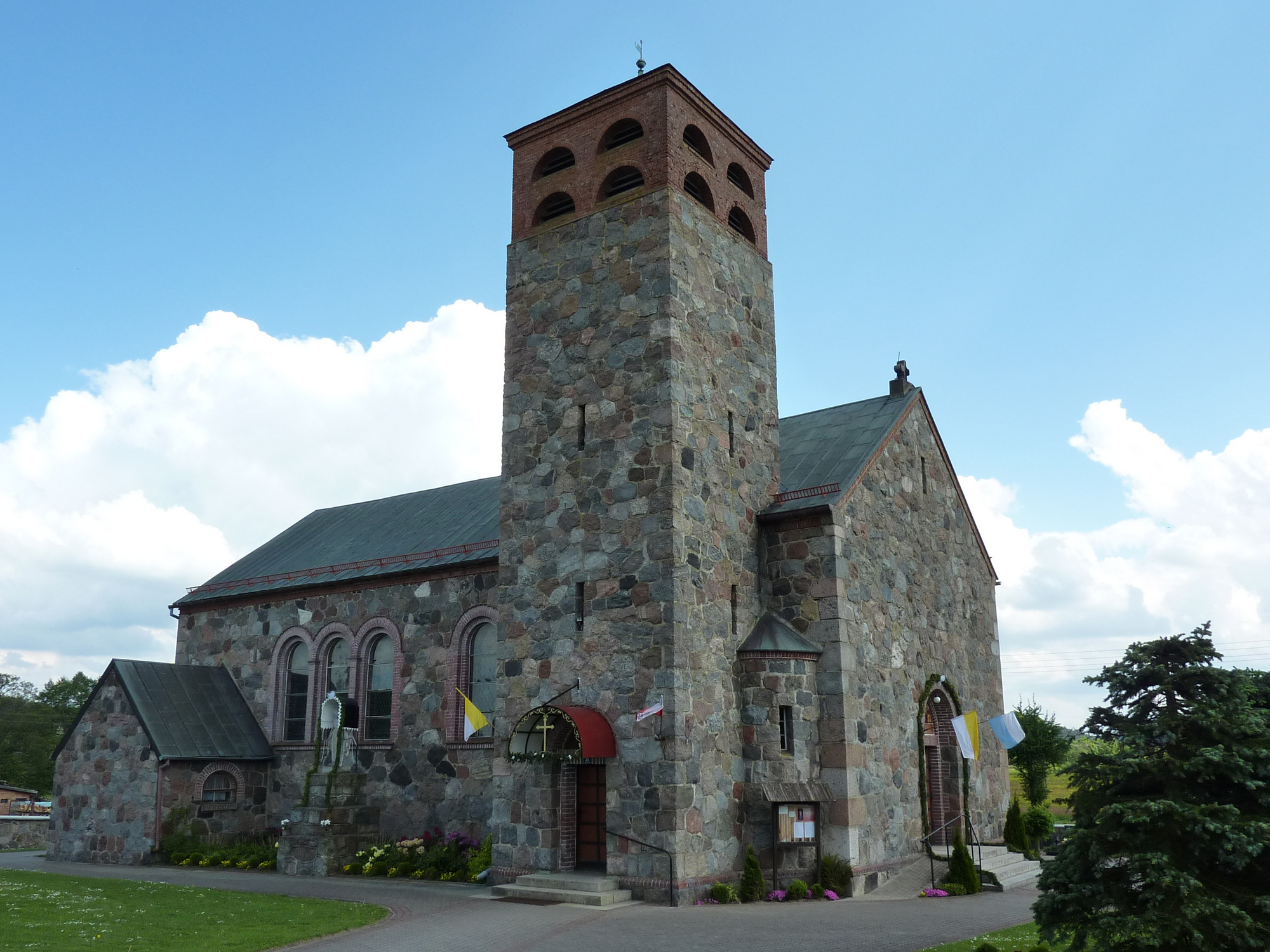 Niezabyszewo 33 - rzymskokatolicki kościół parafialny pw. św. Mikołaja Biskupa, 1854-1857, 1930-1933.